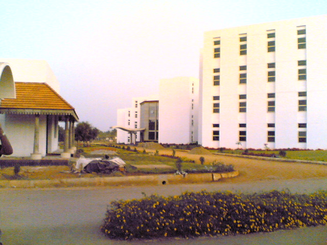 VVIET, Mysore